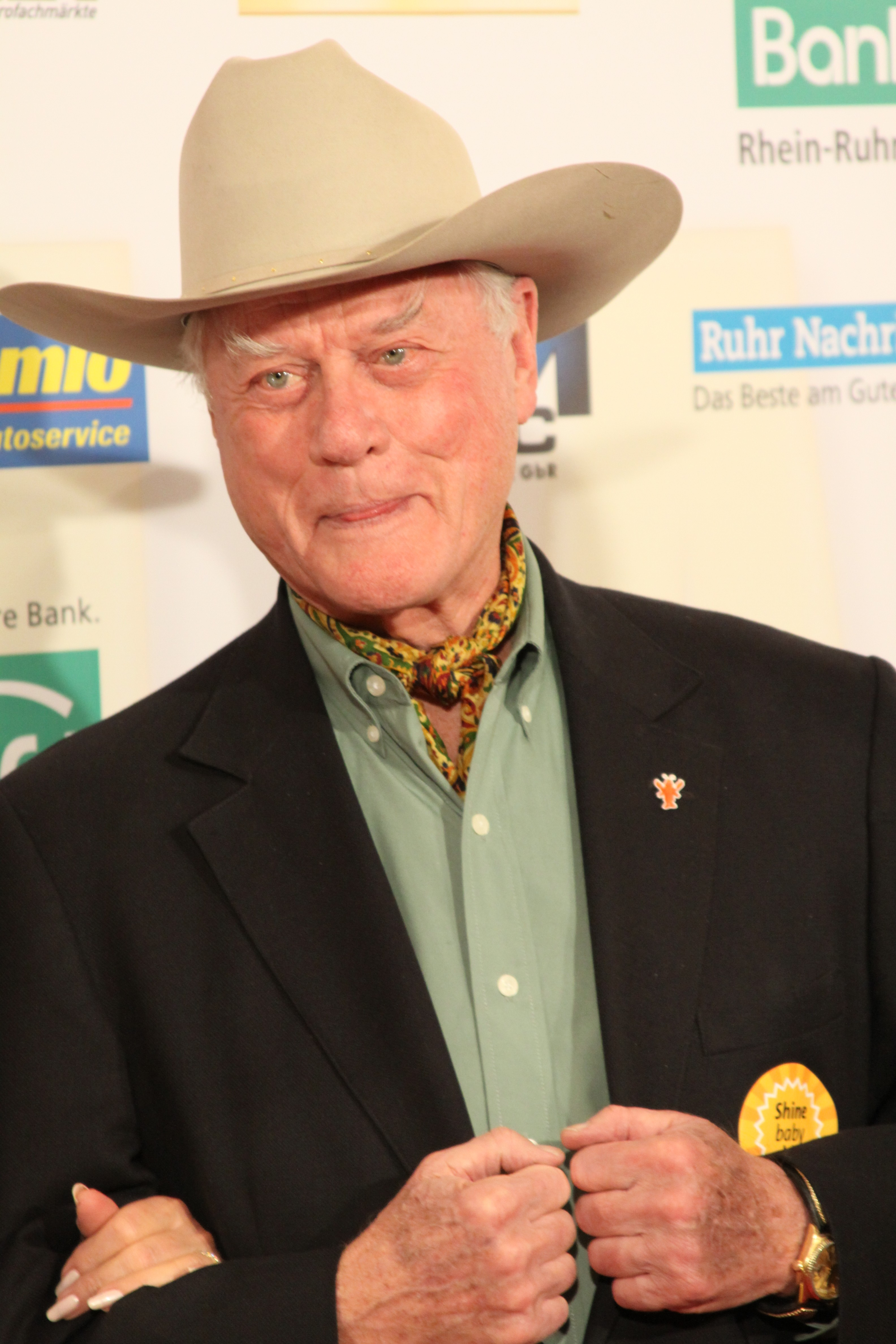 Larry Hagman auf der Kinderlachen Gala am 27.11.2010 in Berlin